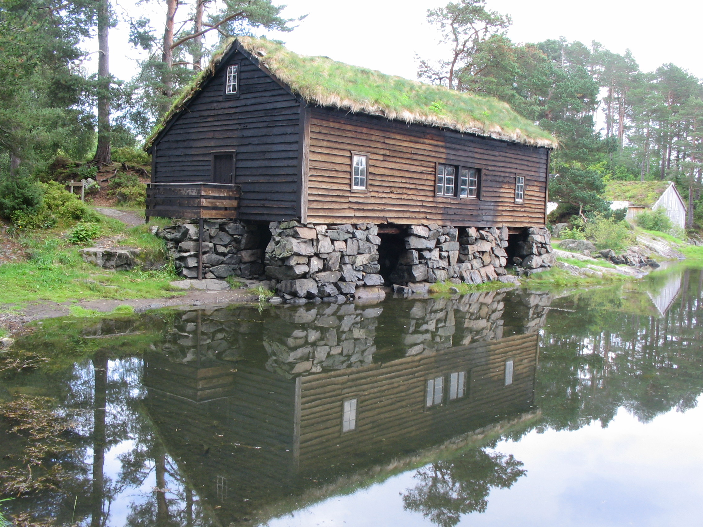 owe photo